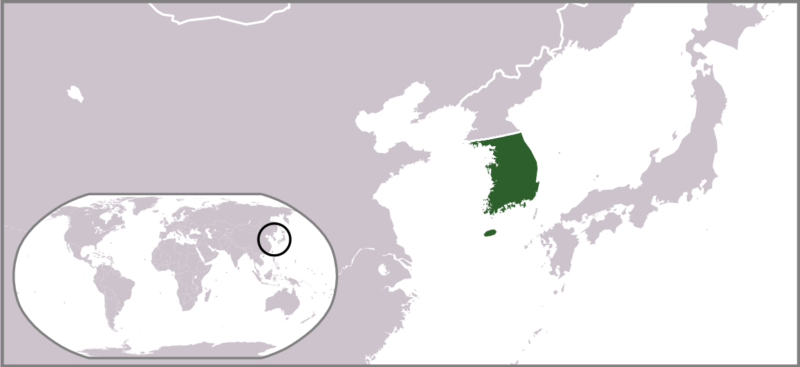 驻朝鲜美国陆军司令部军政厅法定管辖范围。